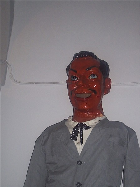 Gigantes de Alcalá de Henares